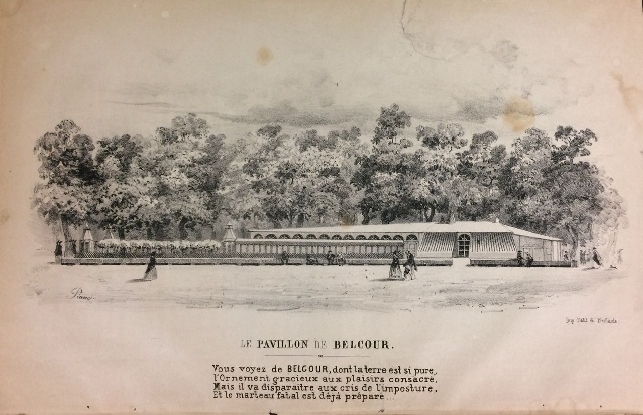 Le pavillon de Bellecour. Source : Girard, Mme, née Machiolleti, La Reine des Tilleuls, ou la Limonadière de Bellecour, à ses amis et à ses ennemis, 1841, p.37.